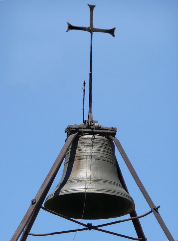 Zoom sur la cloche du beffroi de Châteauneuf de Mazenc (26160)